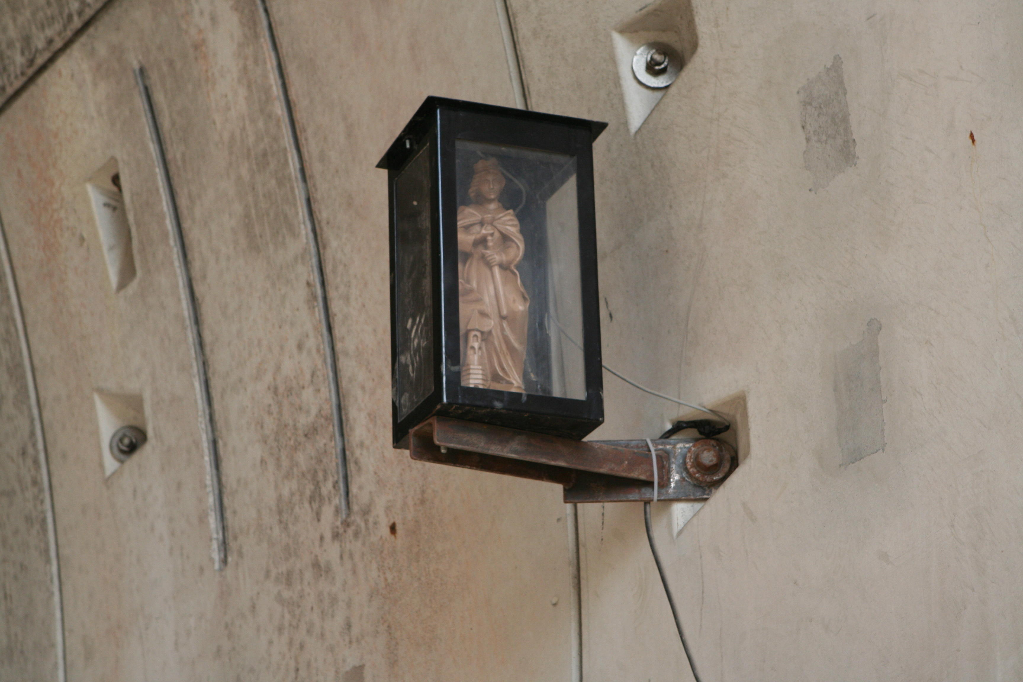 Finnetunnel, Heilige Barbara